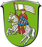 Wappen von Grünberg